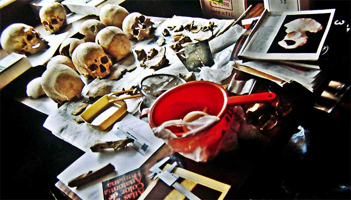 Fase de análisis de restos humanos medievales exhumados en la necrópolis de San Cebrian de Mazote, Valladolid, España